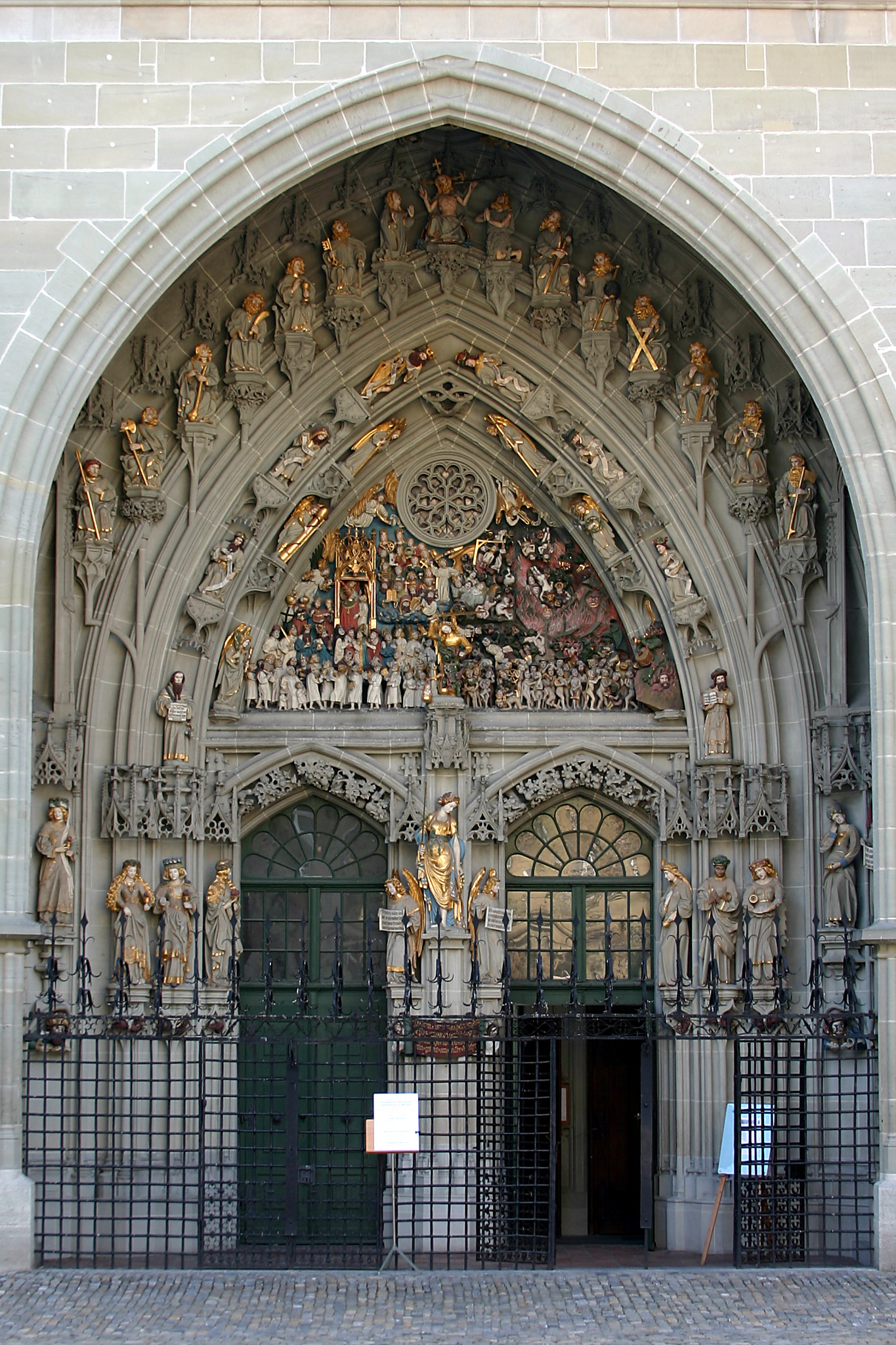 Portal, Berner Münster, Bern, Switzerland